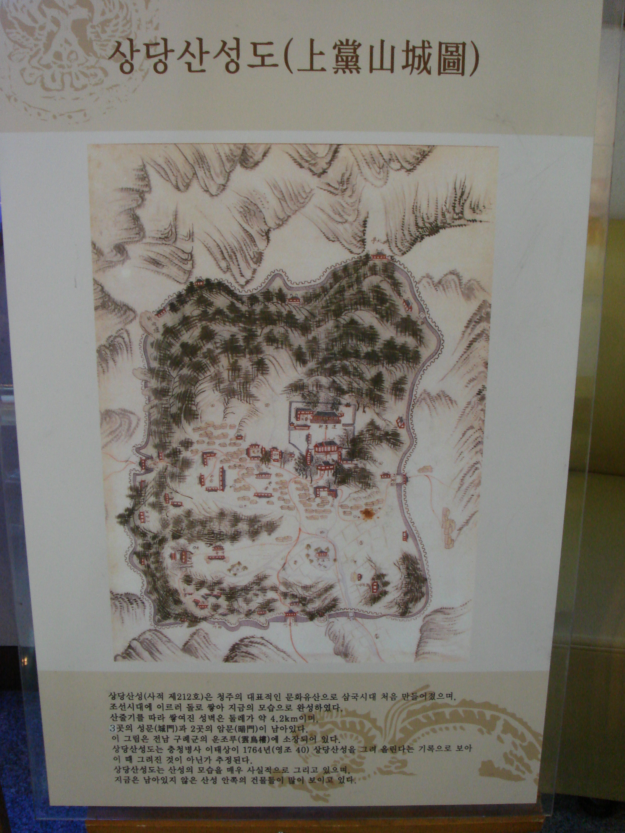 상당산성 전도